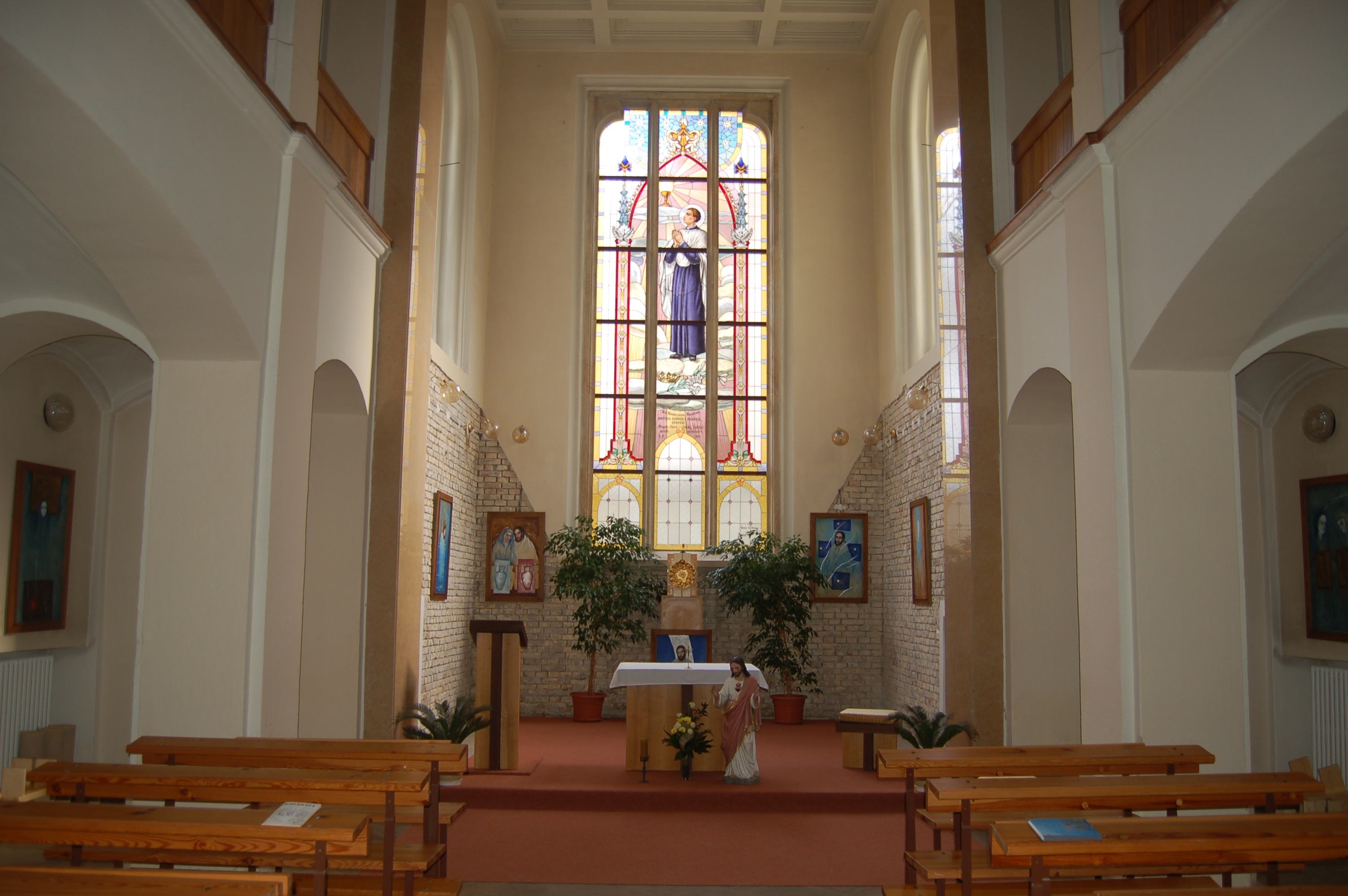 Arcibiskupské gymnázium v Kroměříži: kaple svatého Stanislava Kostky